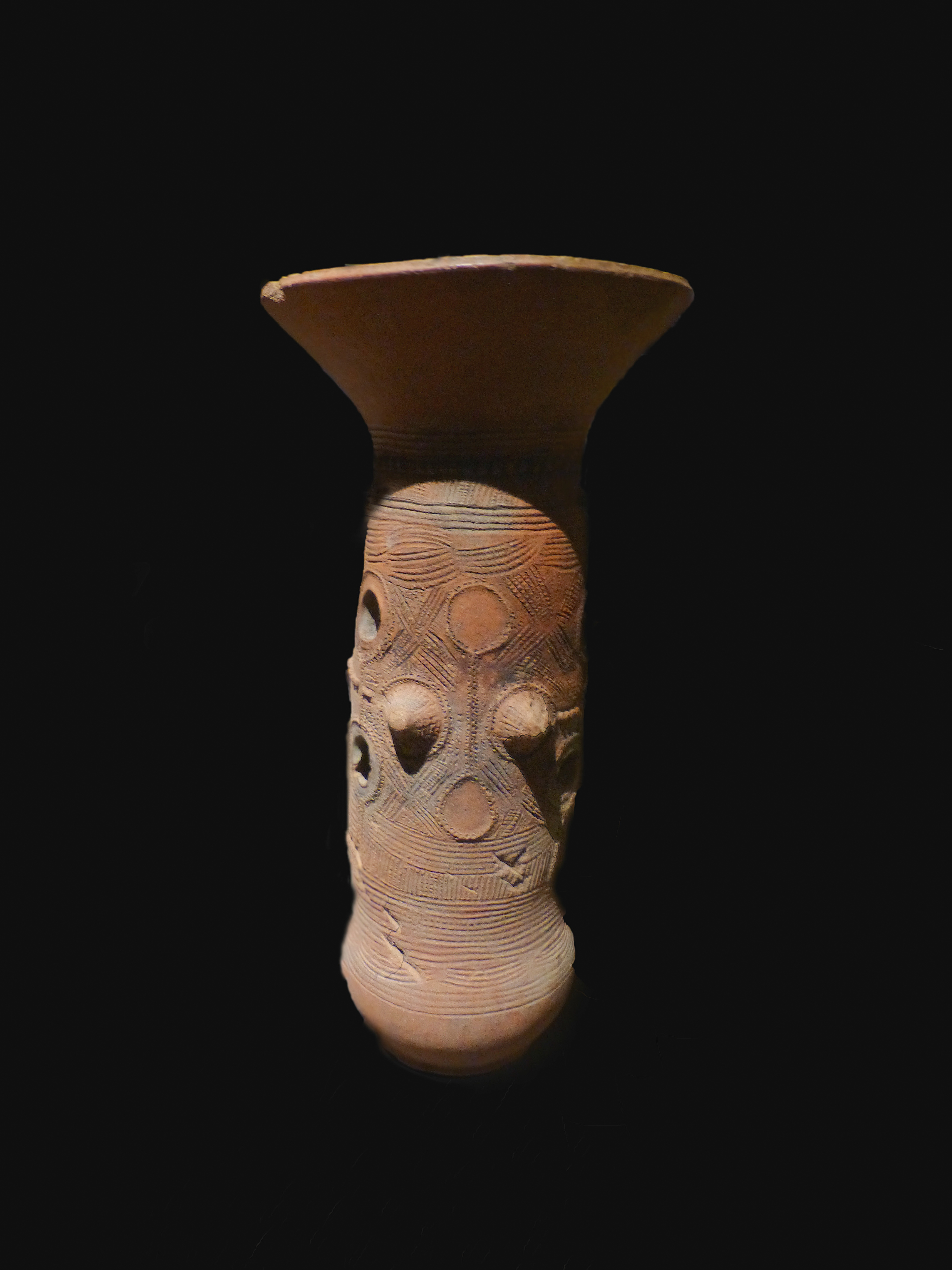 Porte-pot en terre cuite. Bida, Nigeria. Population Nupe. Début ou milieu du XXe siècle. Lyon, France. Musée des Confluences